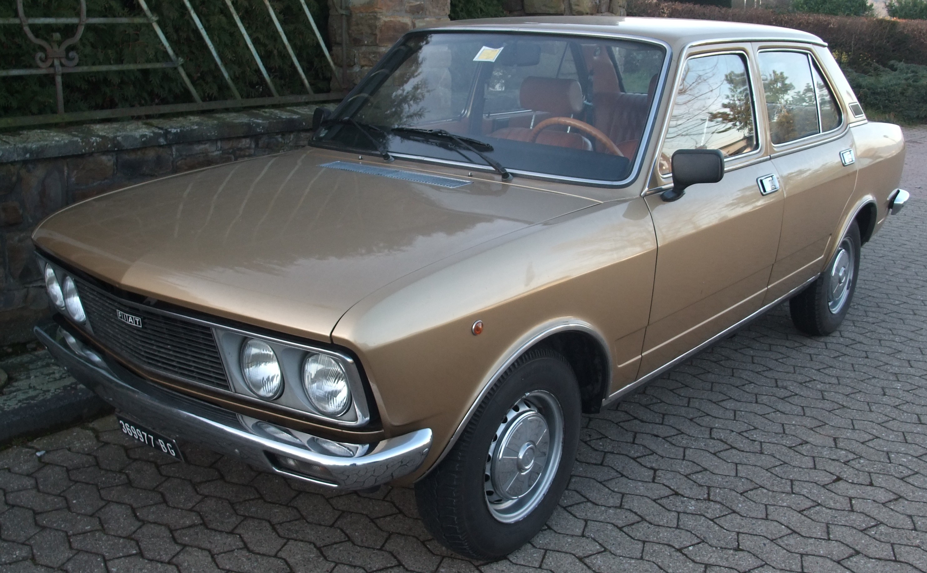 Fiat 132 erste Serie Front